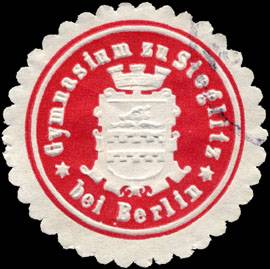 Sealing stamp Title: Gymnasium zu Steglitz bei Berlin Description: rot, weiß, geprägt Place: Steglitz size: 4 cm